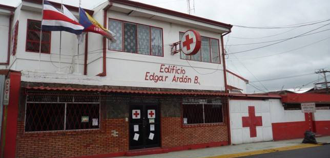 Edificio de la Cruz Roja en Guadalupe, Goicoechea. Costa Rica.